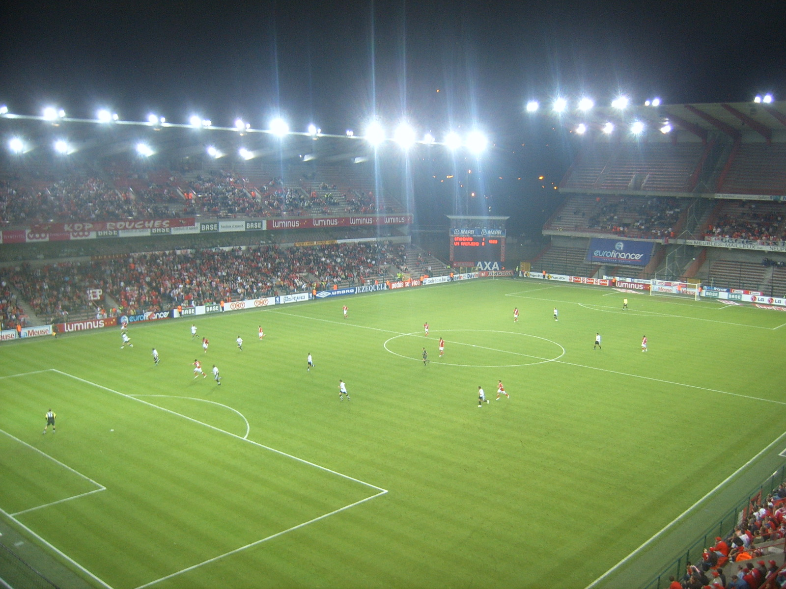 Coupe d'Europe à Standard de Liège - UN Käerjeng à Stade de Sclessin